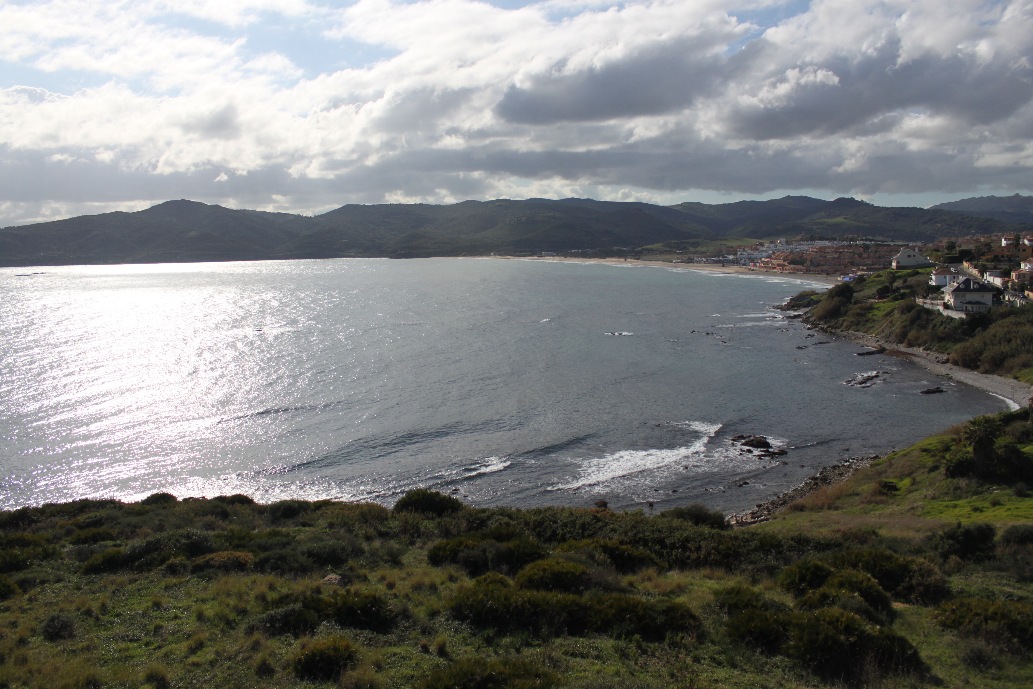 Ensenada de Getares, en la bahía de Algeciras, Andalucía, España.